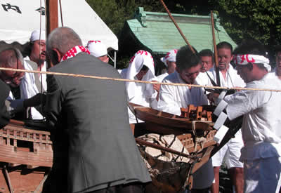 静岡県牧之原市細江で催される神明神社の御船神事